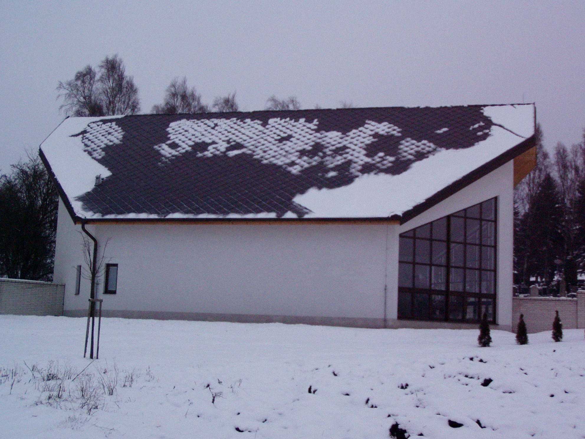 Kaple svaté Zdislavy